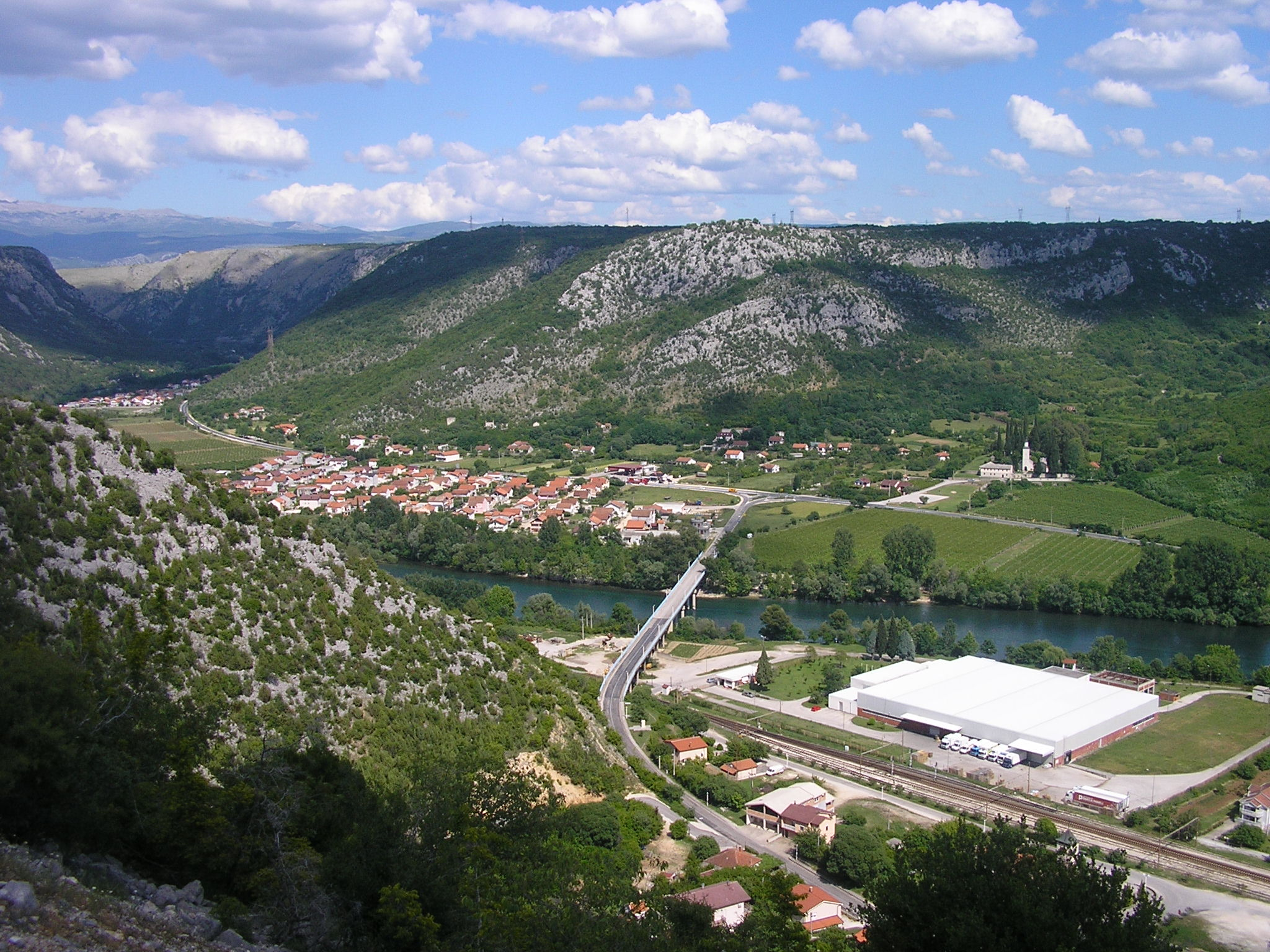 Žitomislići